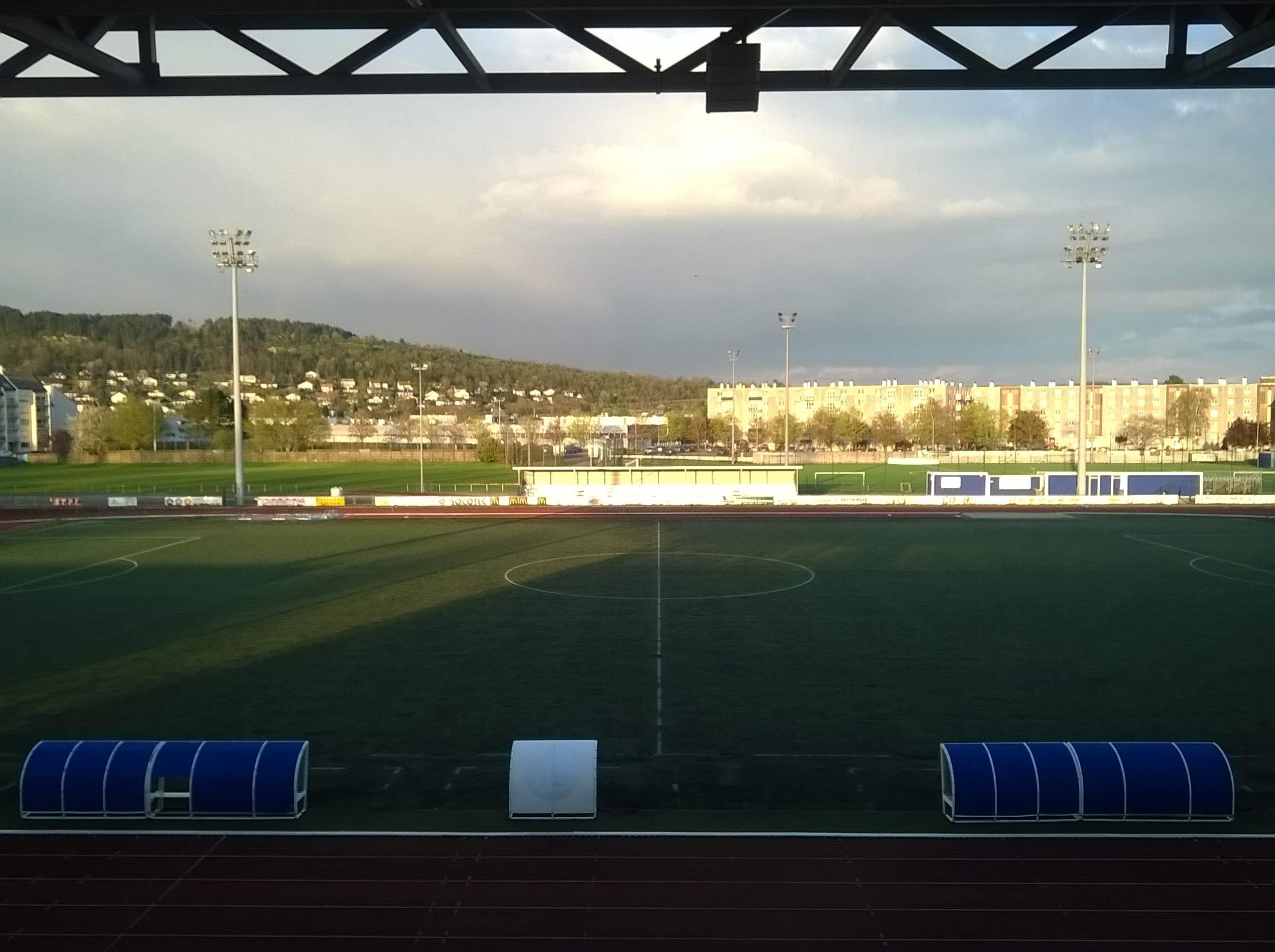 Vesoul stade René-Hologne vue des tribunes